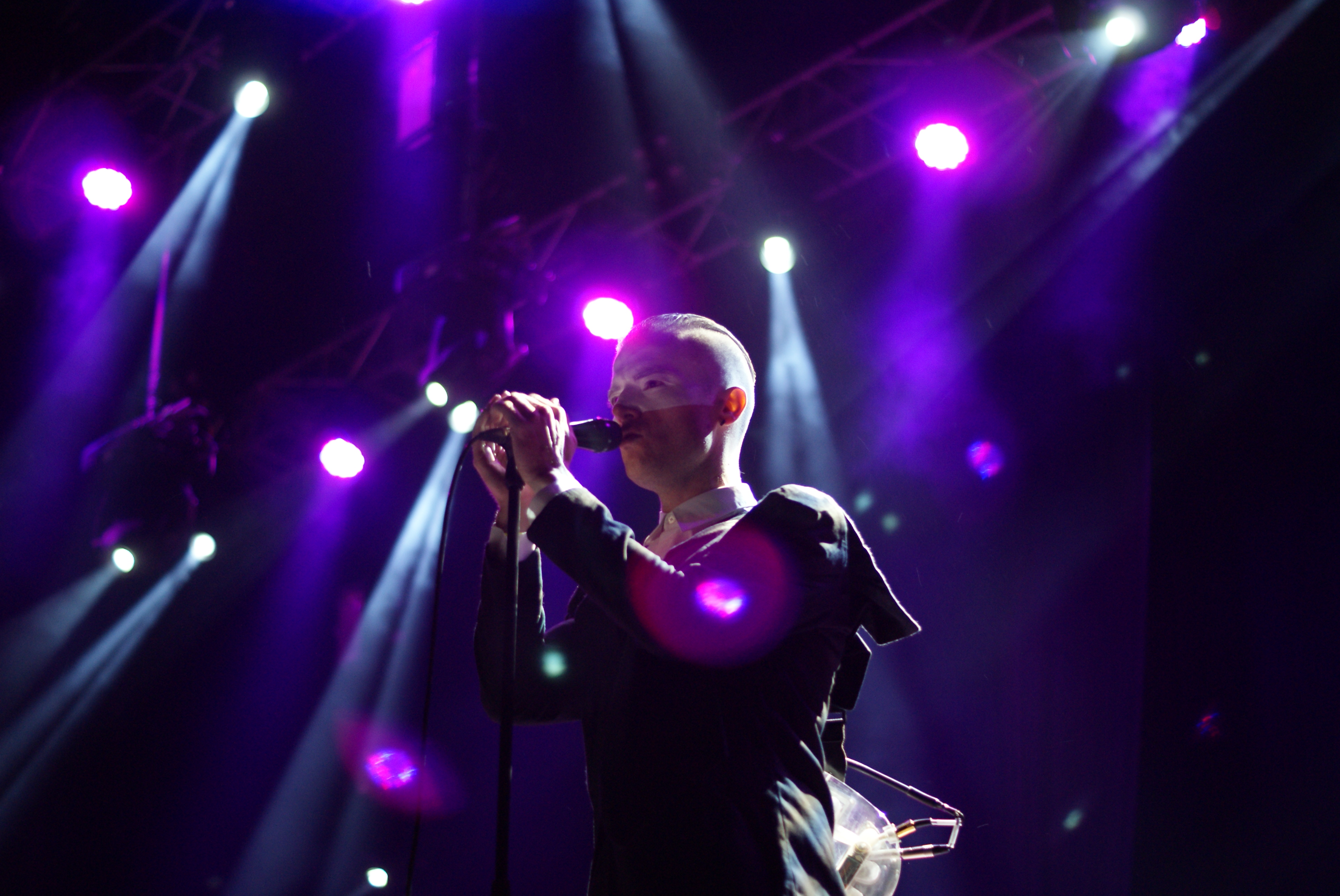 El grupo Monarchy en el festival Palencia Sonora 2016.